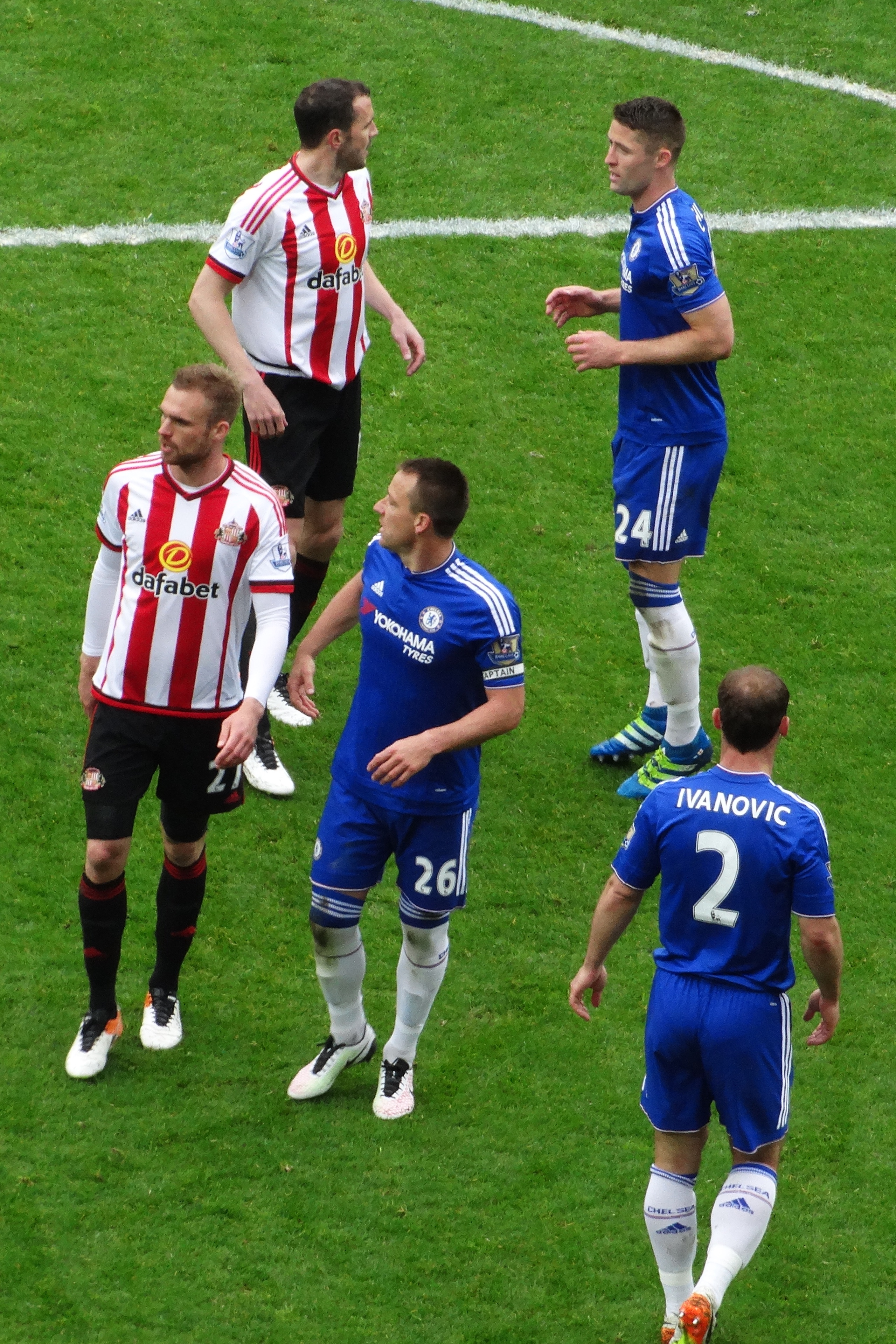 Sunderland 3 Chelsea2